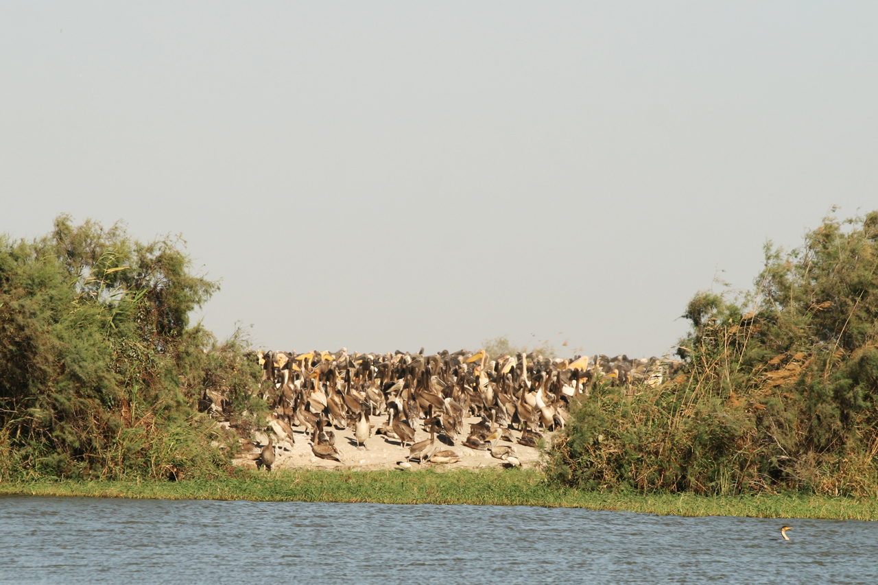 White Pelicans dans la reserve de Djoudj